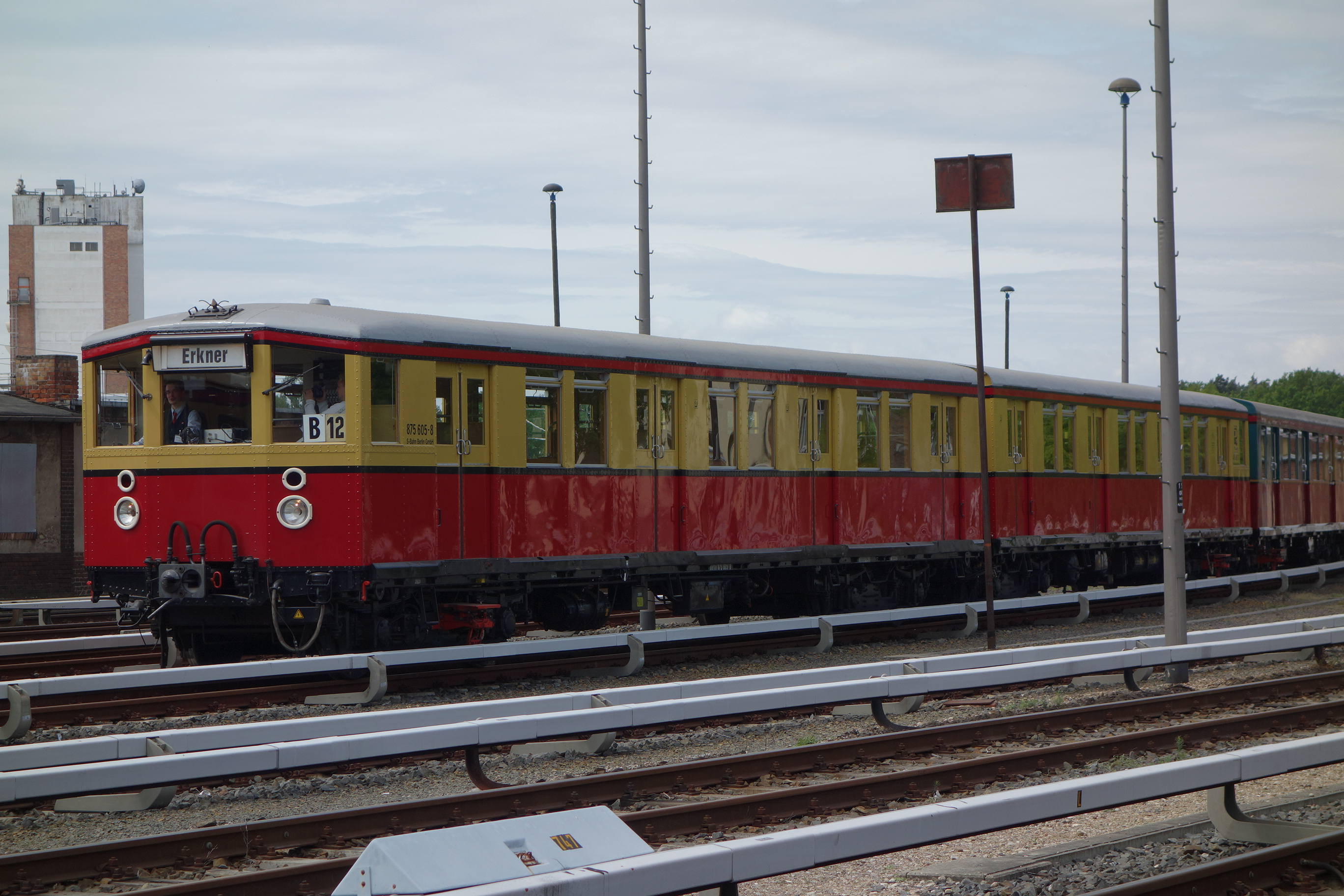 Historischer Zug der S-Bahn Berlin, ET 165 Bauart Stadtbahn, 475 605 / 875 605